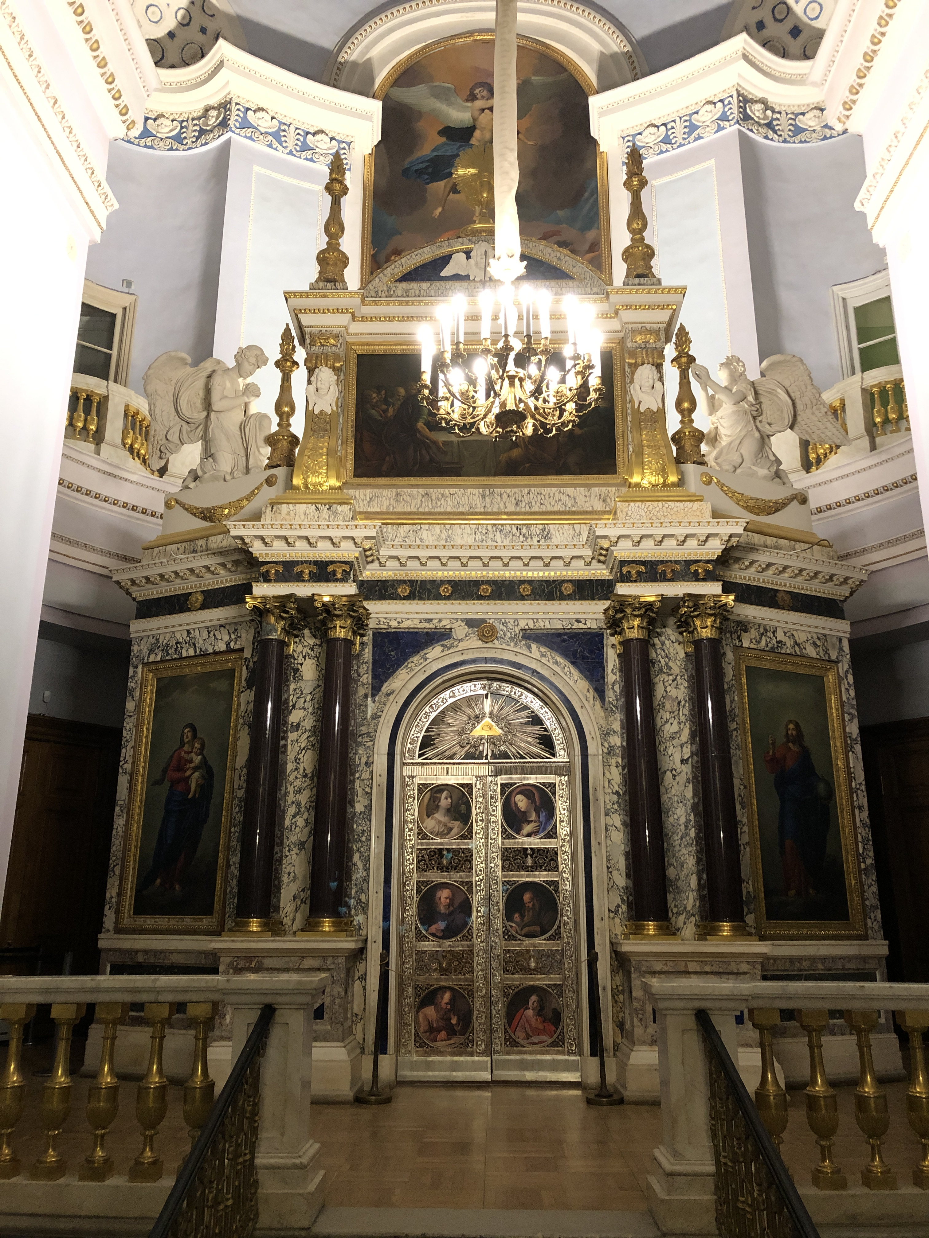 Вил иконостаса церкви Архангела Михаила в Михайловском (Инженерном) замке (г. Санкт-Петербург)